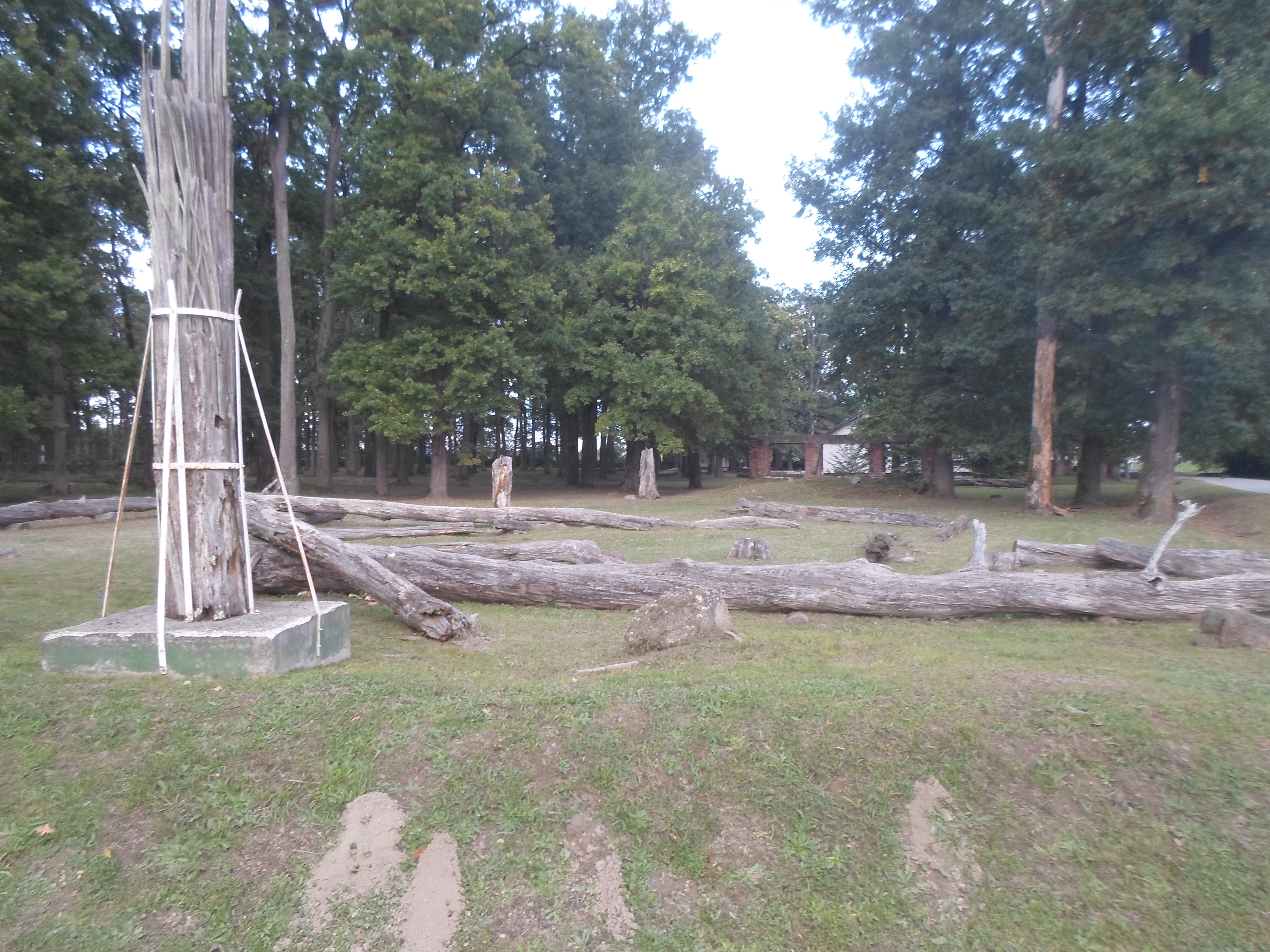 Barutana Bjelovar